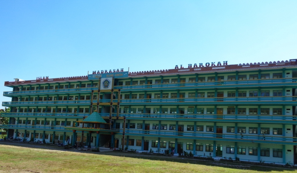 Gedung Sekolah MTs dan MA Al-Barokah